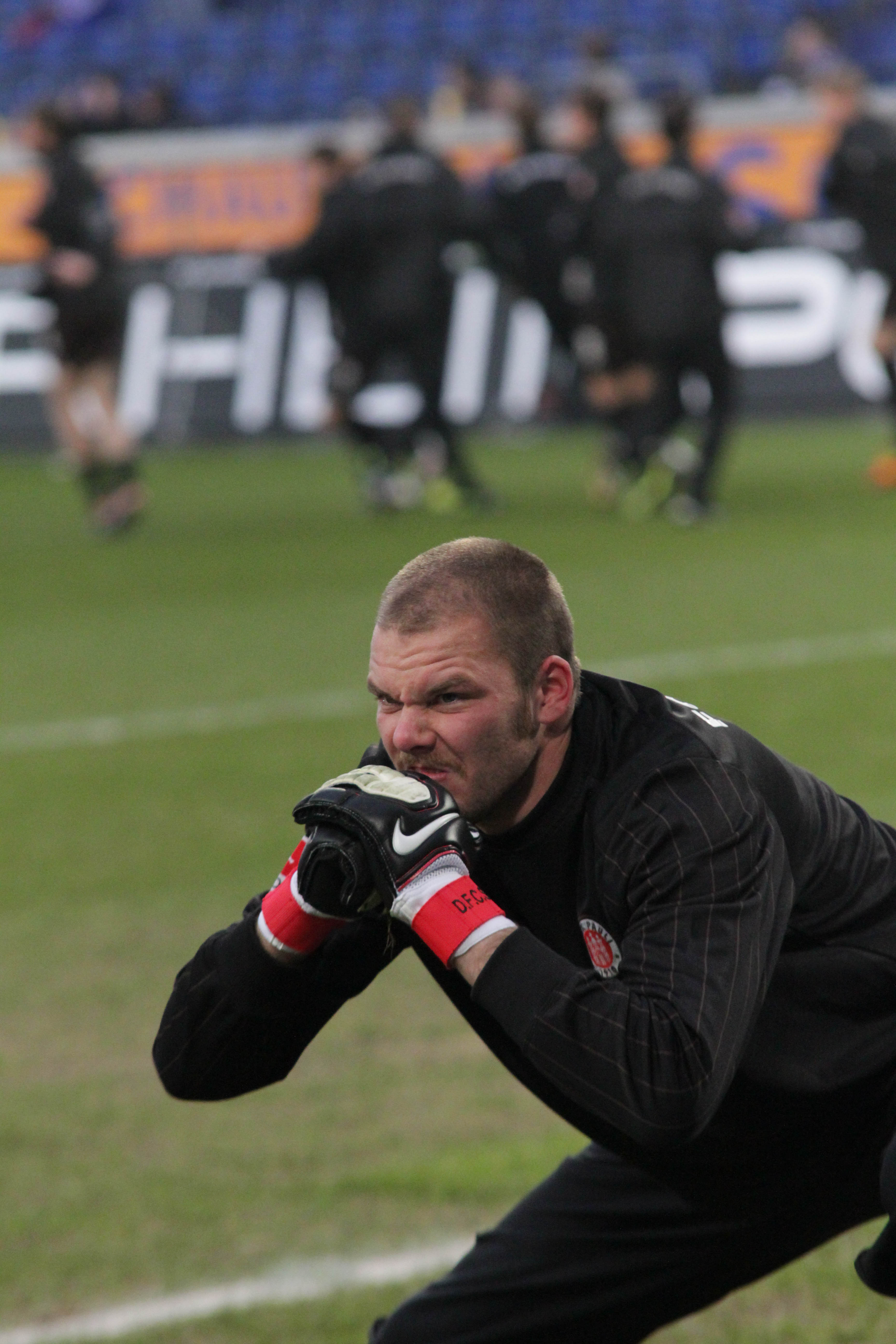 German football goalkeeper Benedikt Pliquett